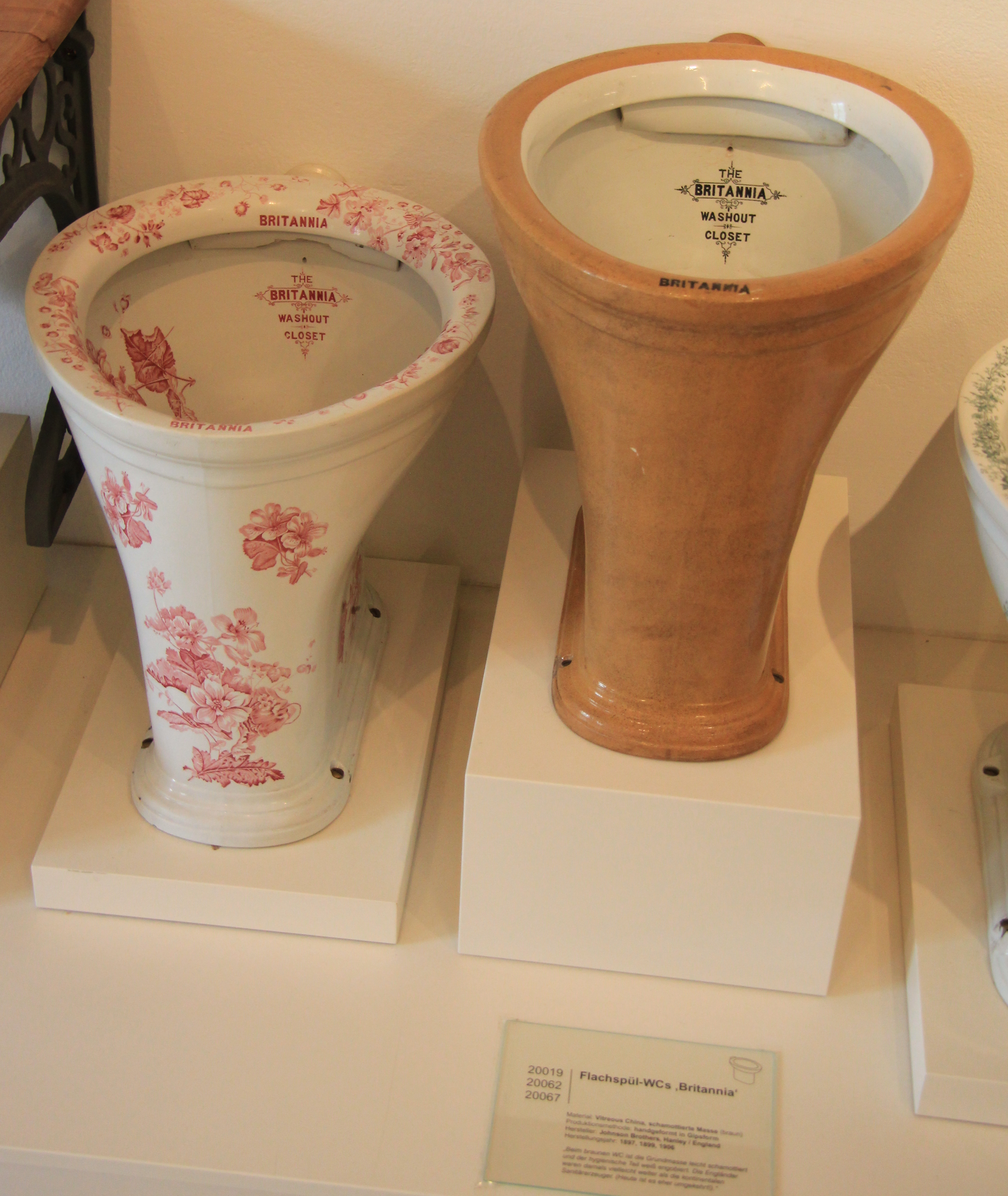 Ausstellungsstück(e) in den Kammerhofmuseen in Gmunden, Oberösterreich